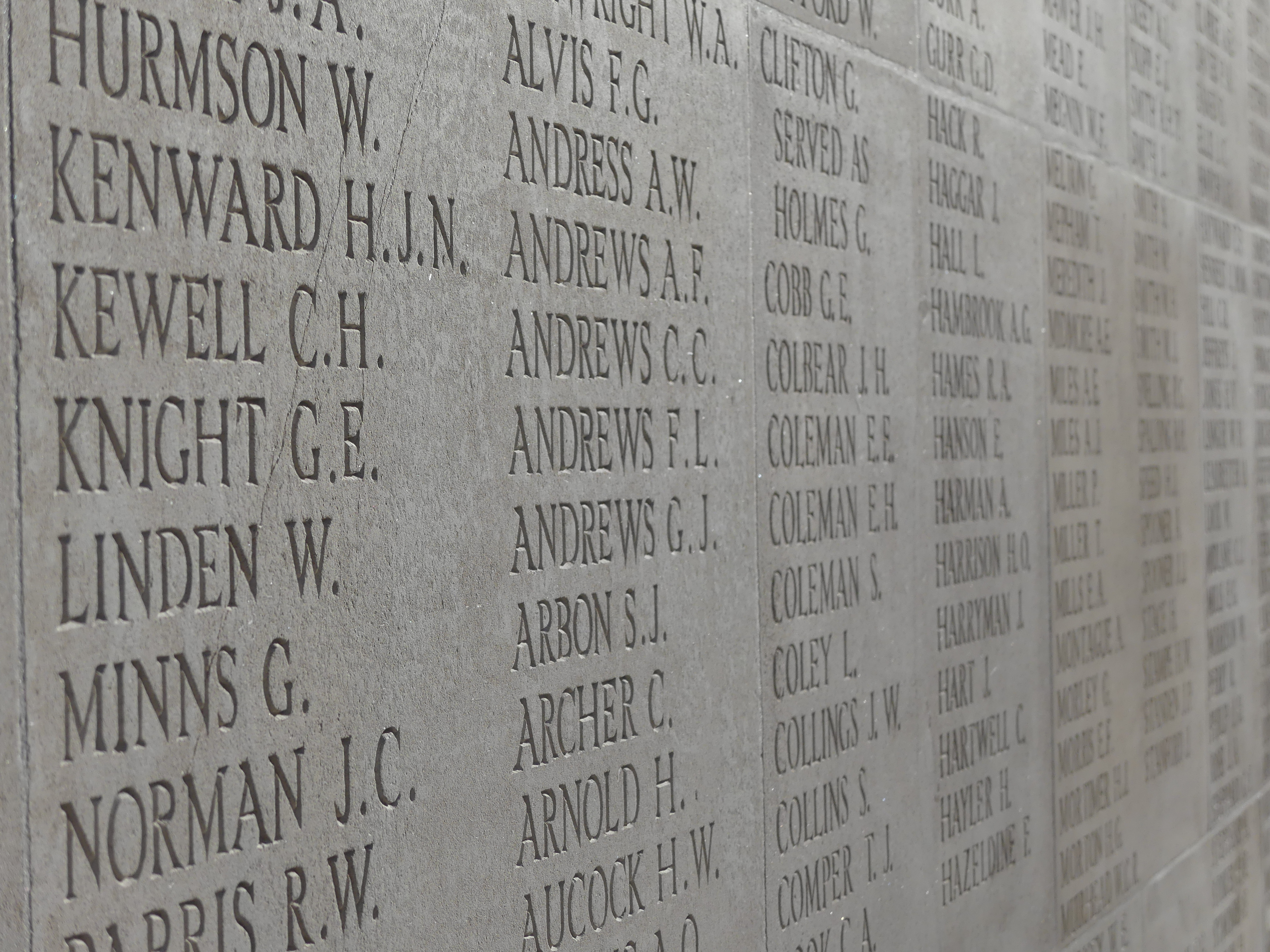 Mémorial de Thiepval - Noms gravés des "Missing of the Somme"